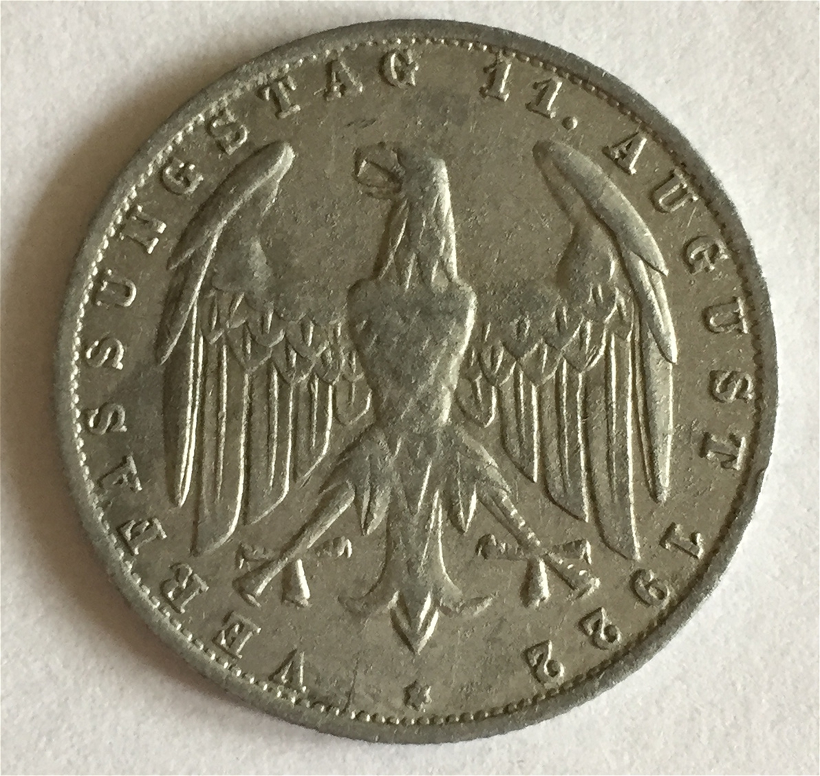 Münze Weimarer Republik Verfassungstag 11.08.1922